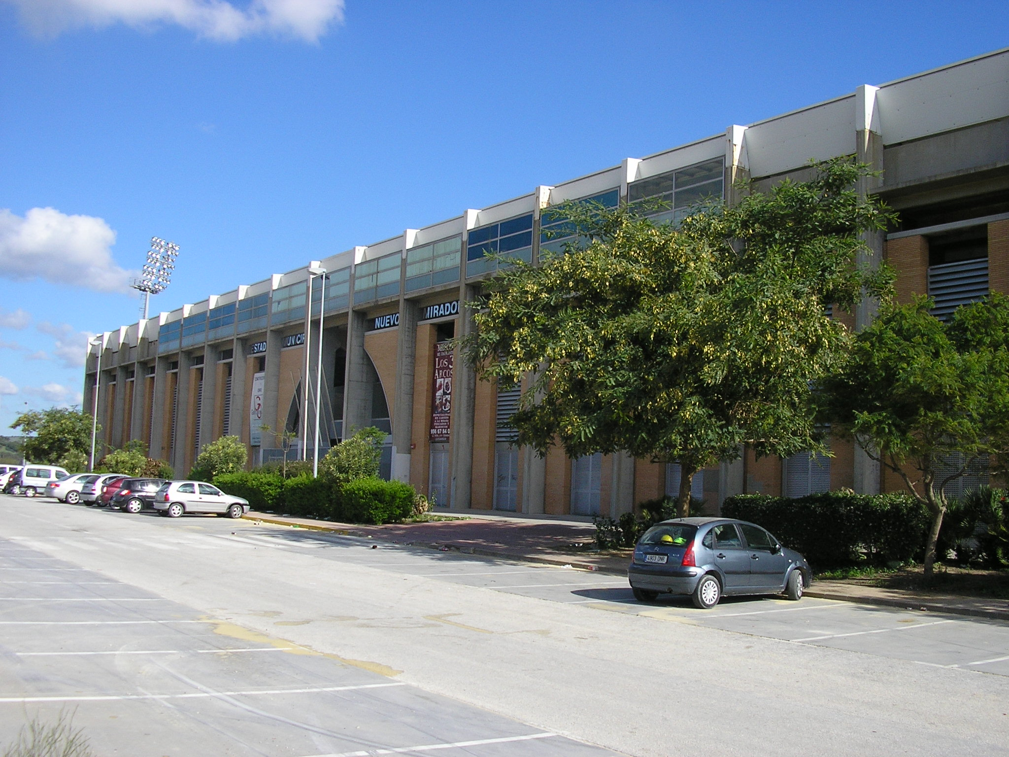 Estedio municipal Nuevo Mirador de Algeciras (España)